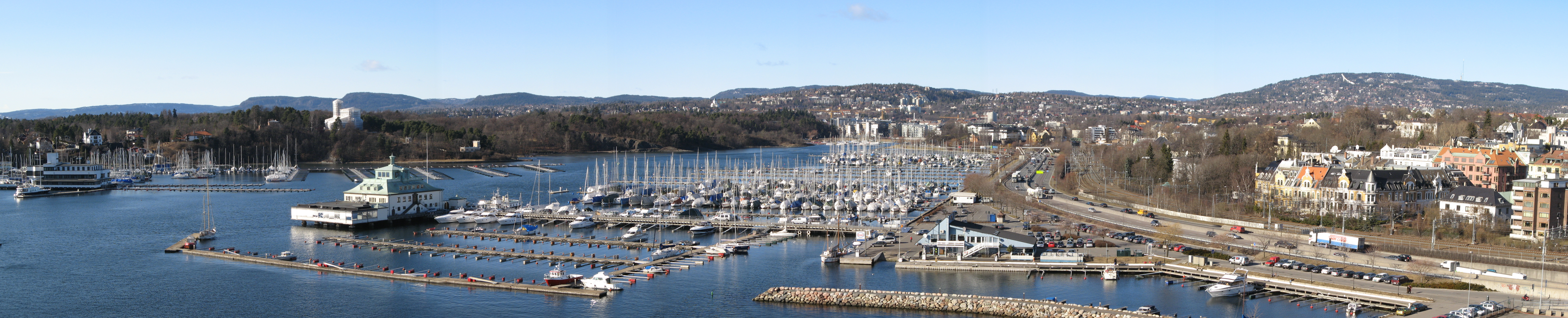 Frognerstranda sett fra Filipstad